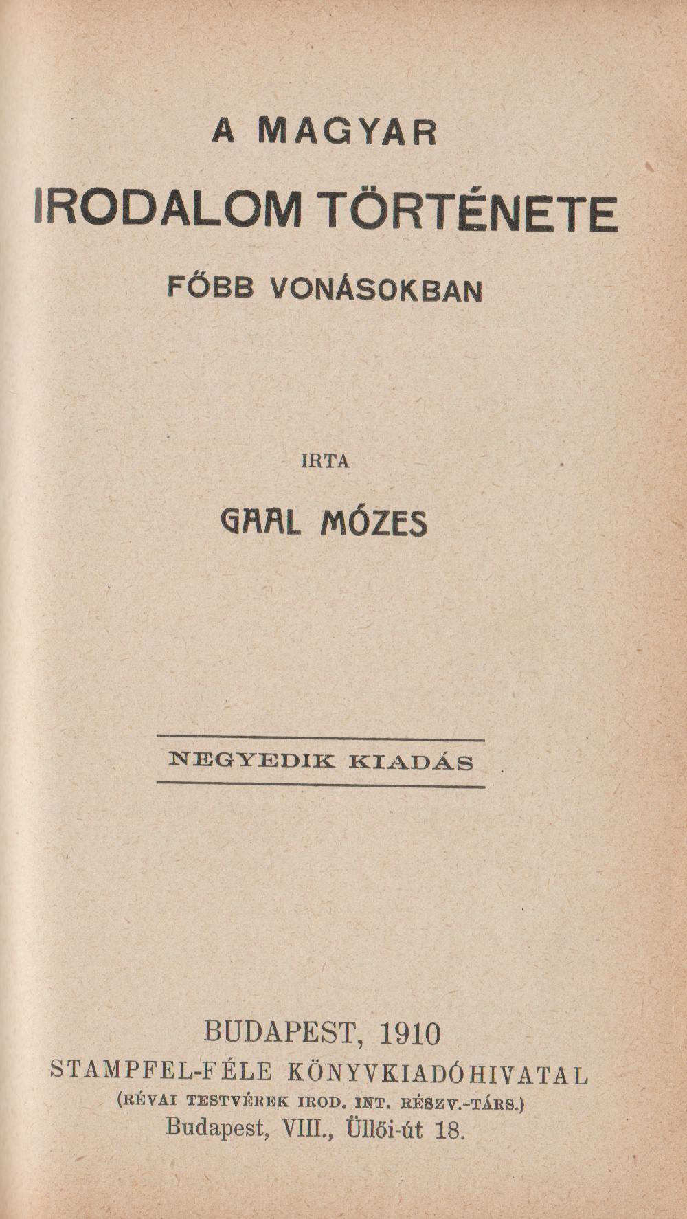 Az adott mű címlapja.